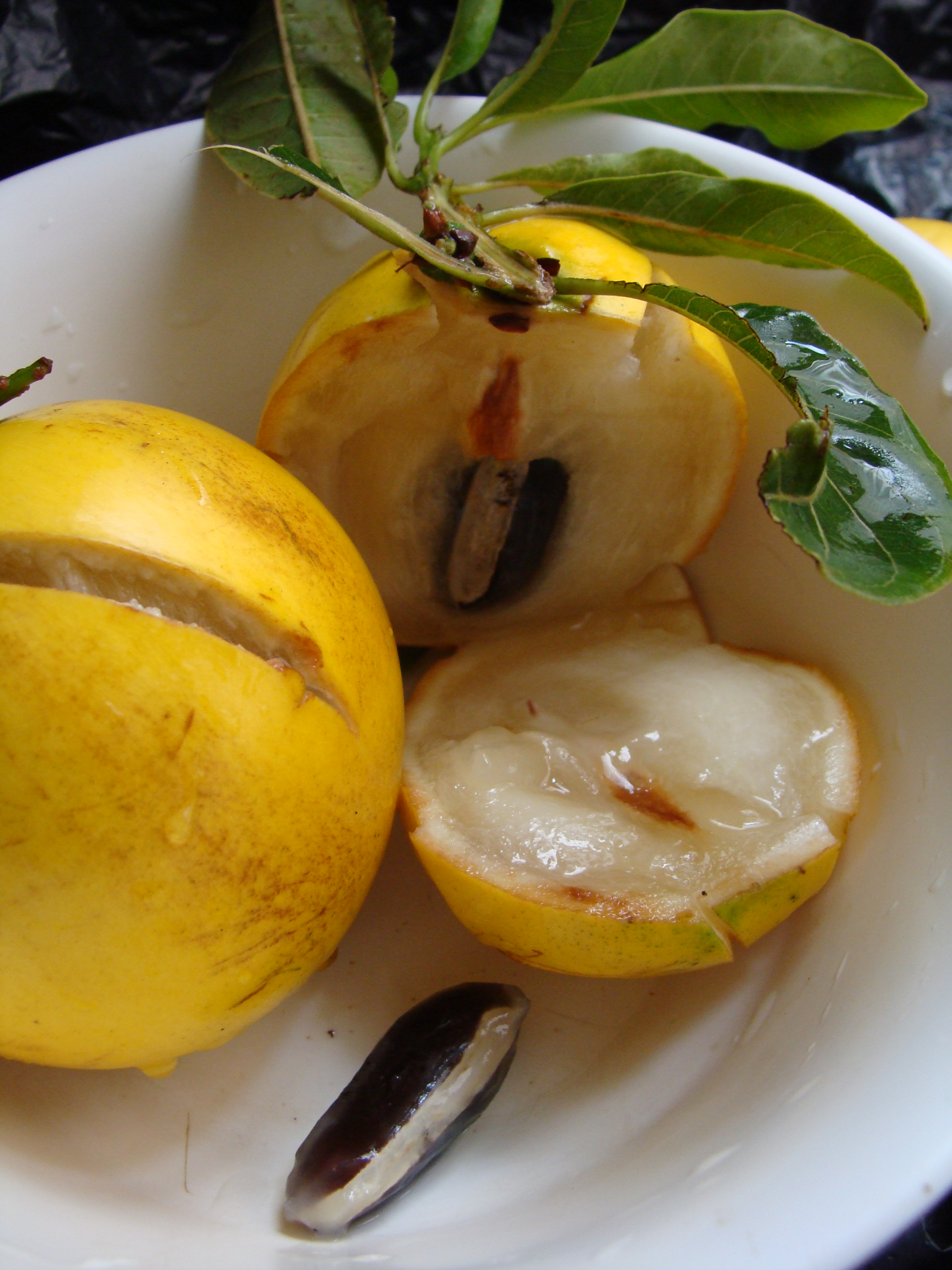 Abiu –fruta do Abieiro